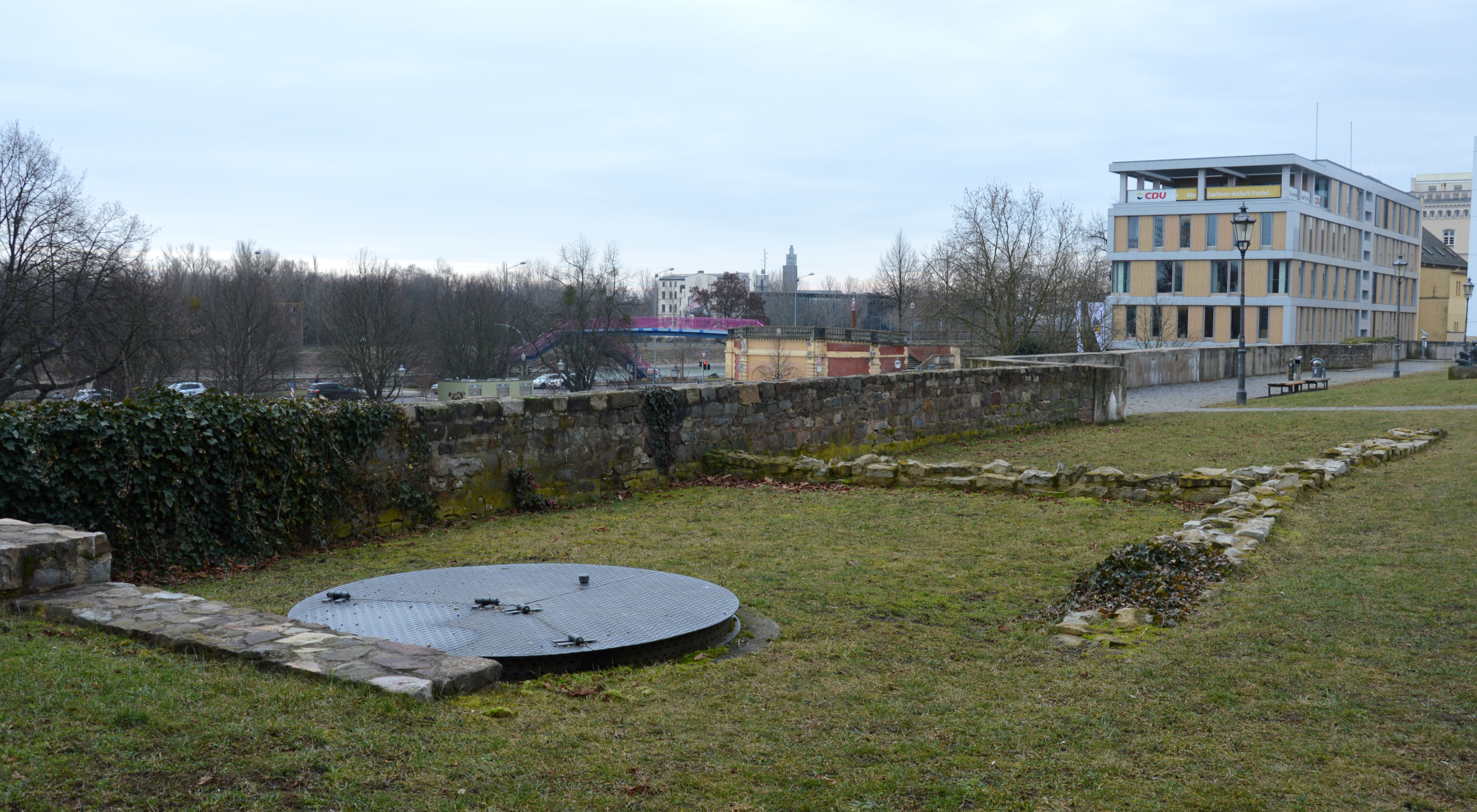 Kellereingang am KULF